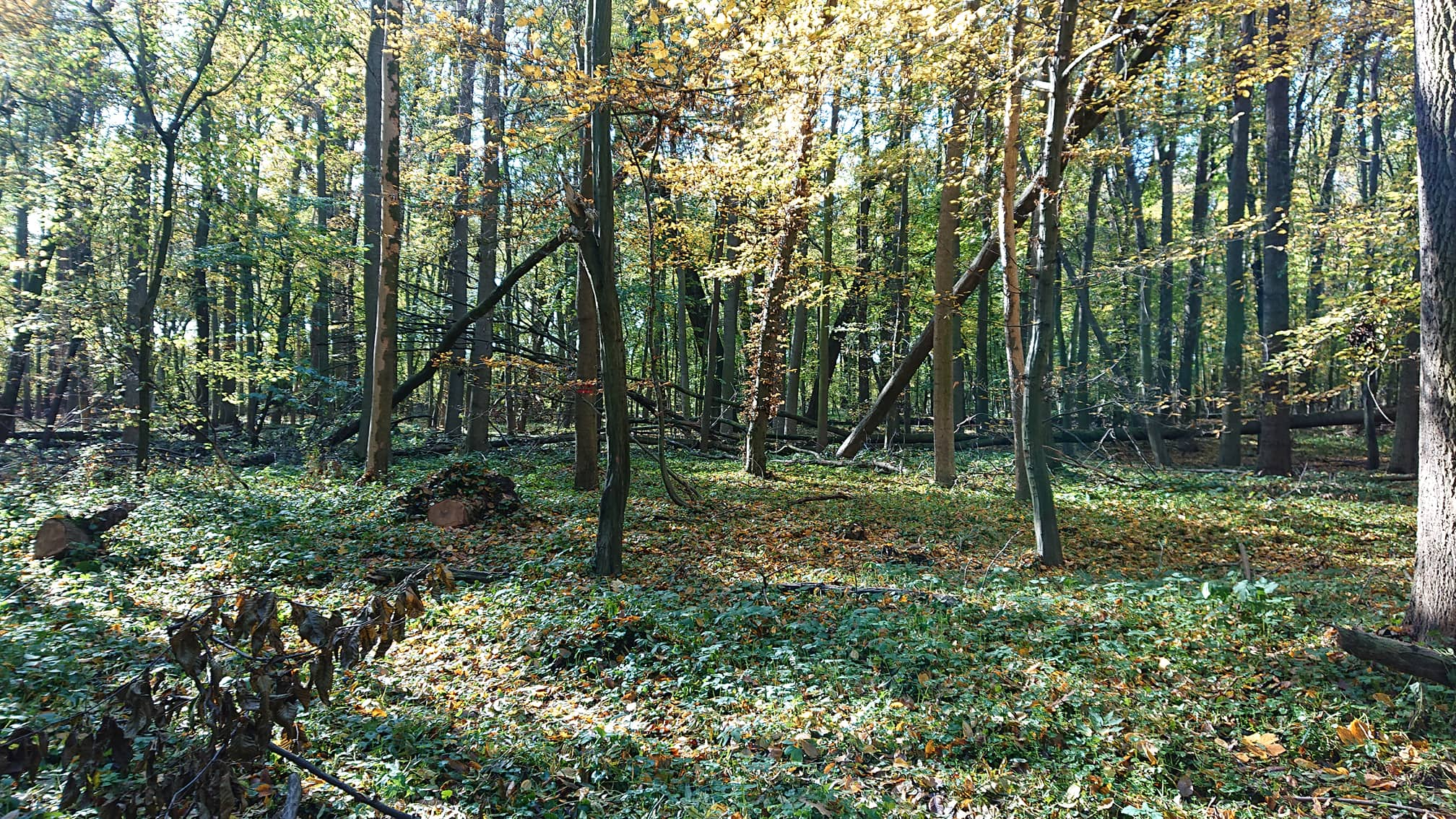 fotka přírodní památky Jiřina - lužní les